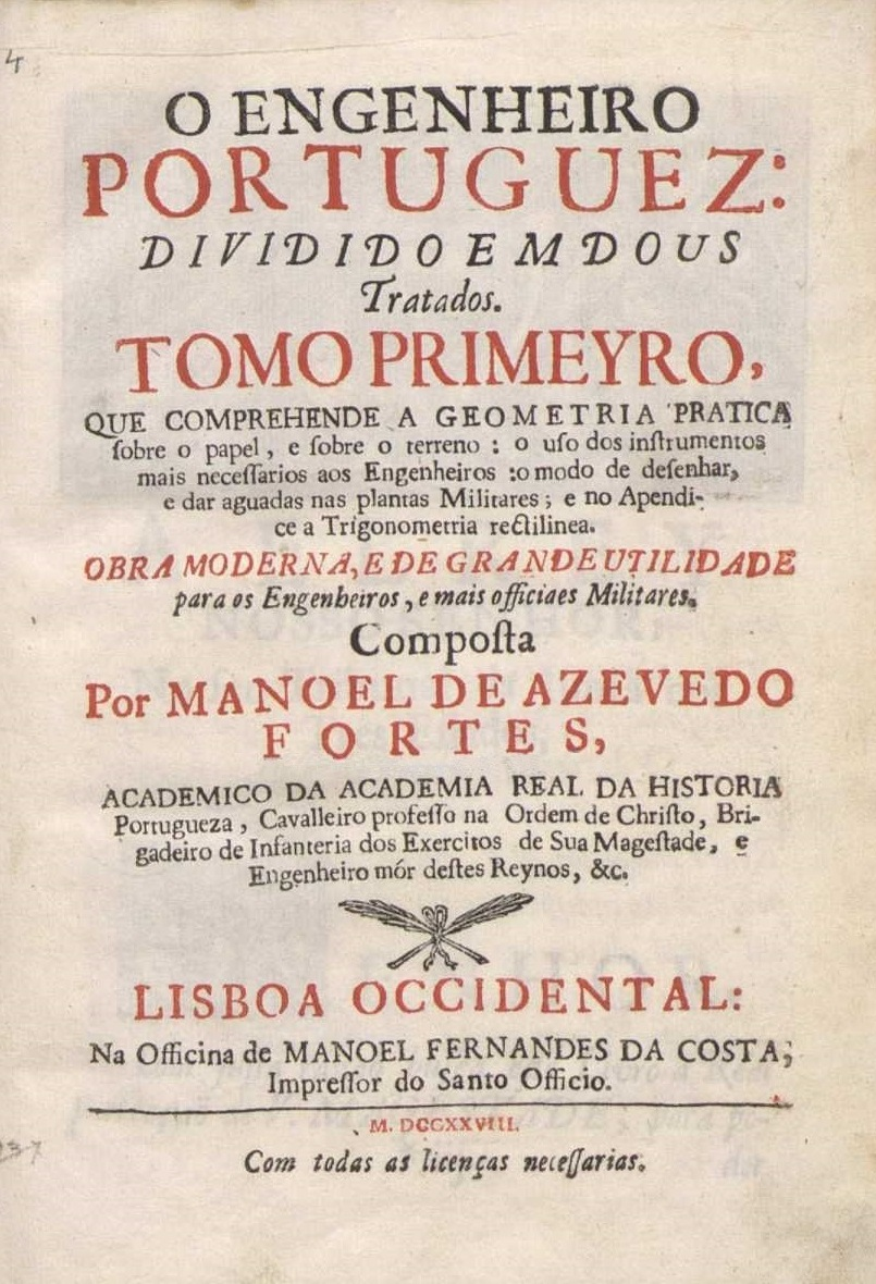 Frontispício do Tomo I de "O Engenheiro Portuguez", de Manuel de Azevedo Fortes (1660-1749)